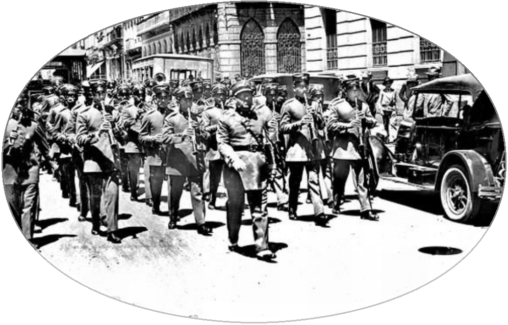 Banda Sinfônica da Polícia Militar do Paraná, sob a regência do maestro Romualdo Suriani, na década de 1920.